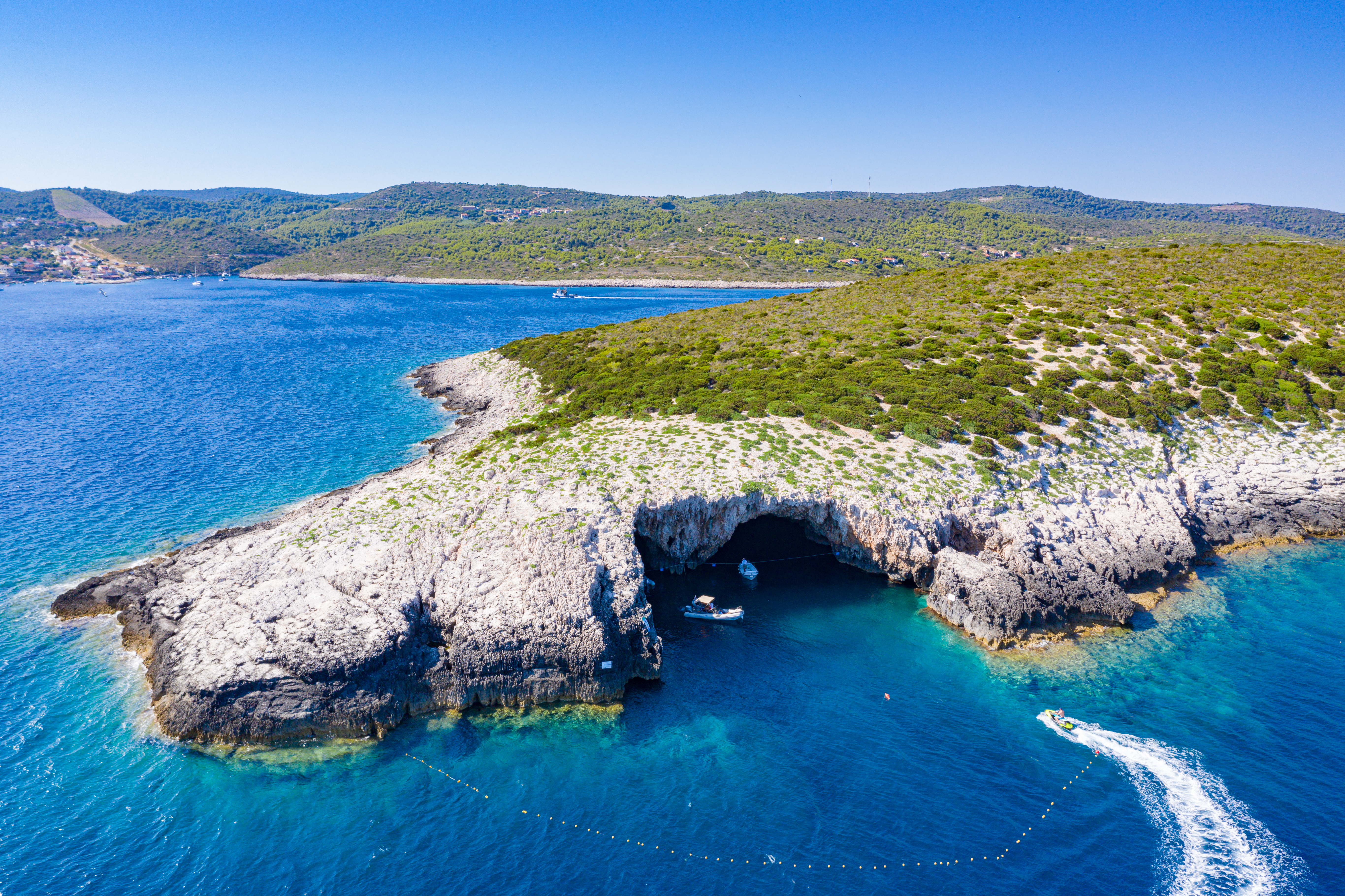 Croatia